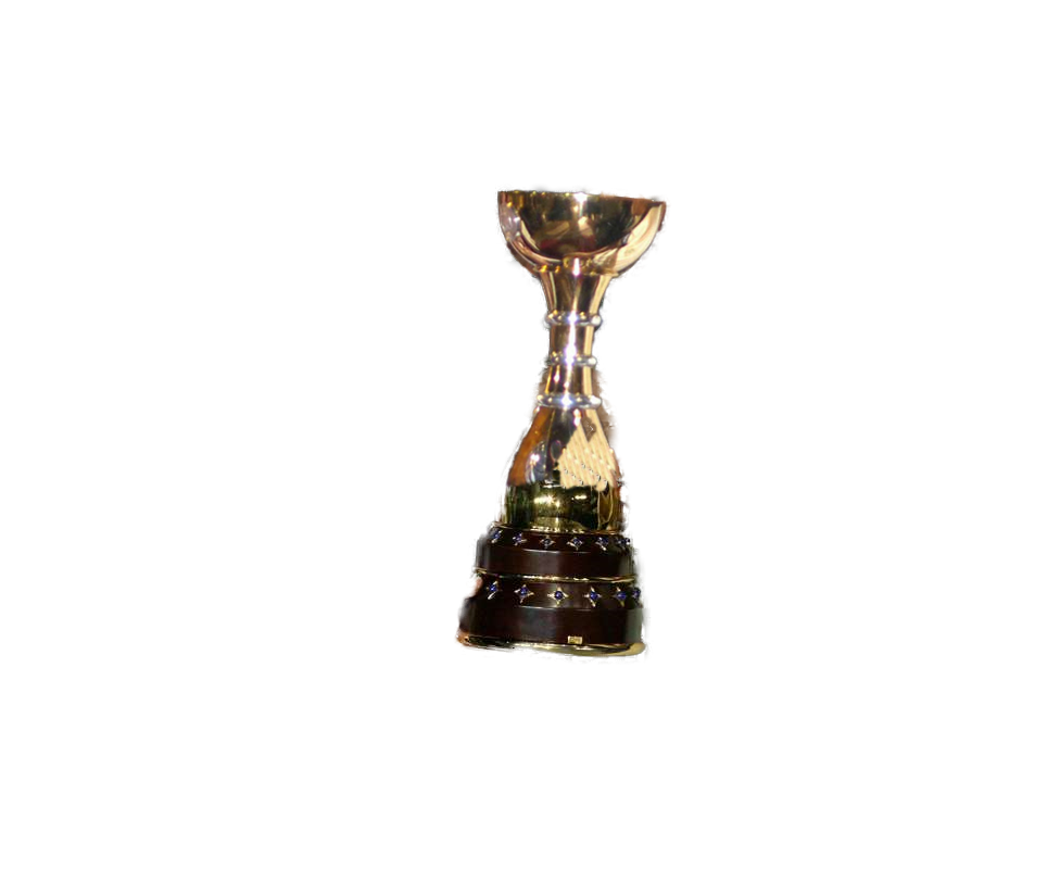 دوري أبطال العرب 2006